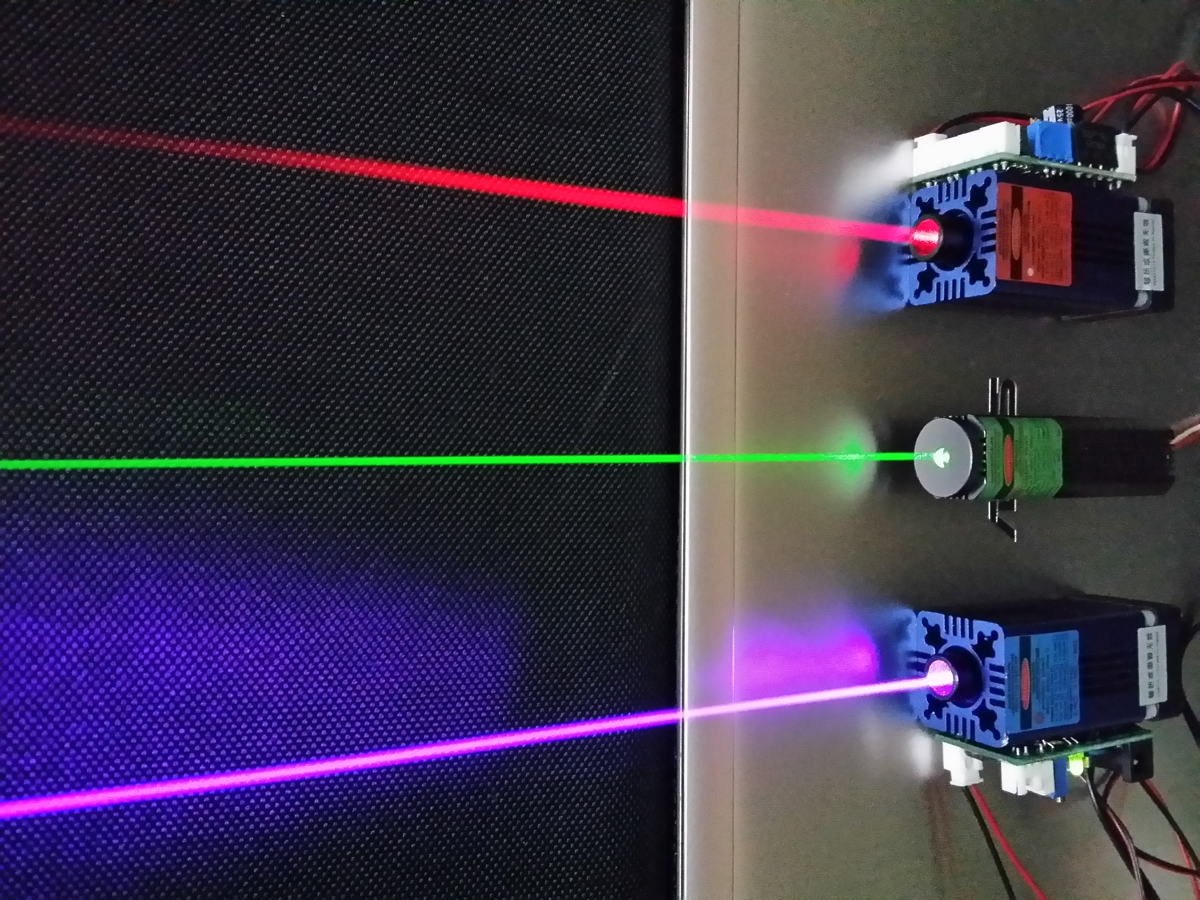 Q-LINE Laser modules